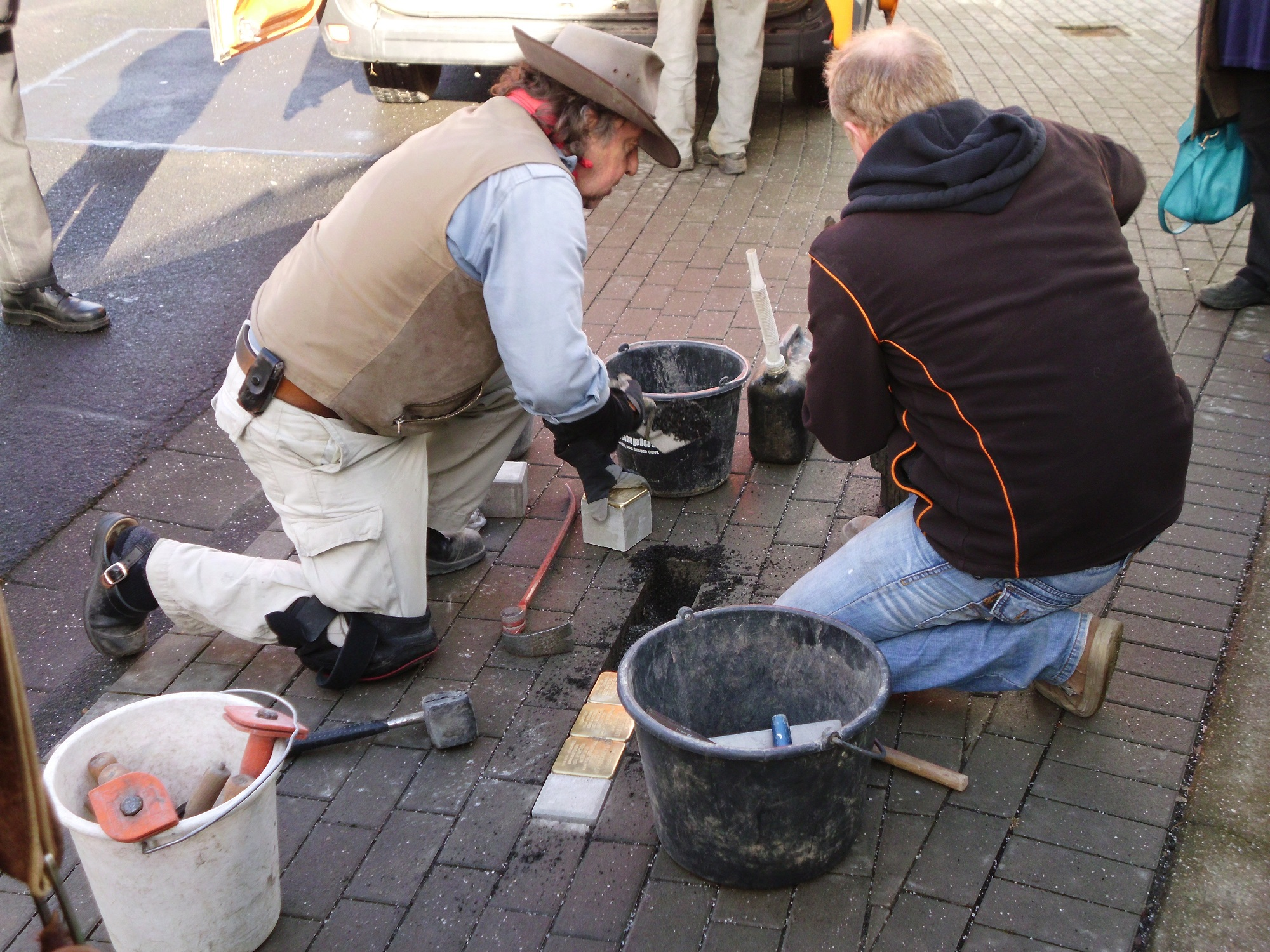 Wetzlarer Straße 31, Butzbach, Freitag, 14. Februar 2014